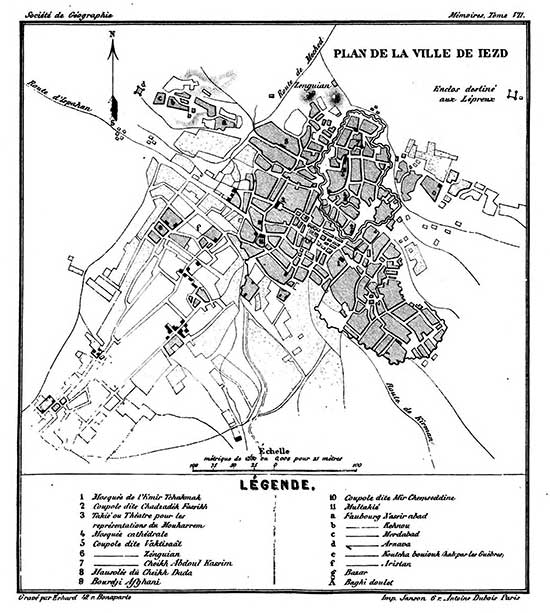 عنوان اصلی:ایرانشناسی نیکلای خانیکف (شرق شناس مشهور روسی) انتشار تصویری از نقشه درکتاب:افشار، ایرج. یزدنامه، جلد دوم، صفحه۲۶۱